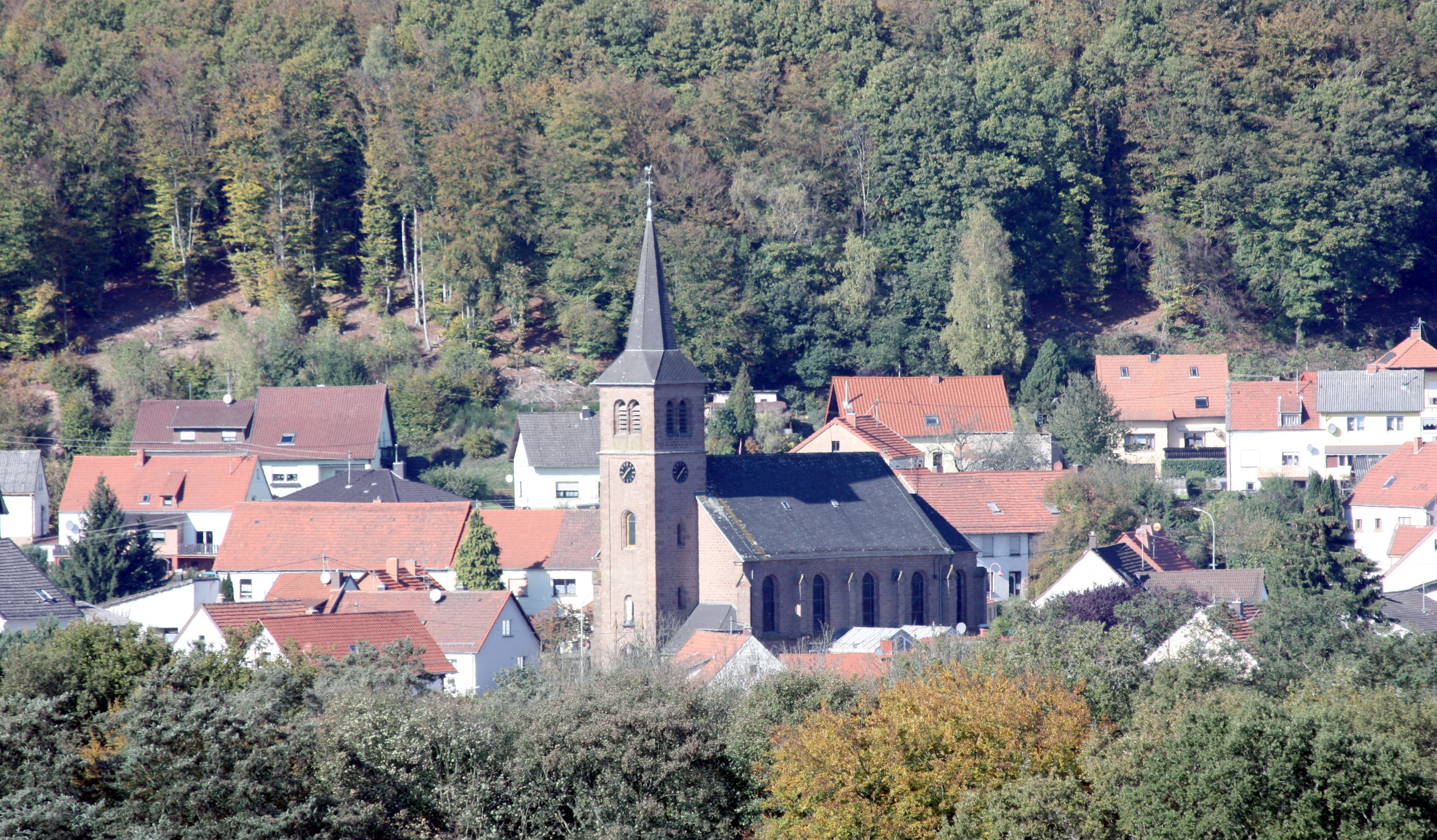 Ortskern von Namborn mit der Kirche Mariä Himmelfahrt. Blick von der Liebenburg aus.